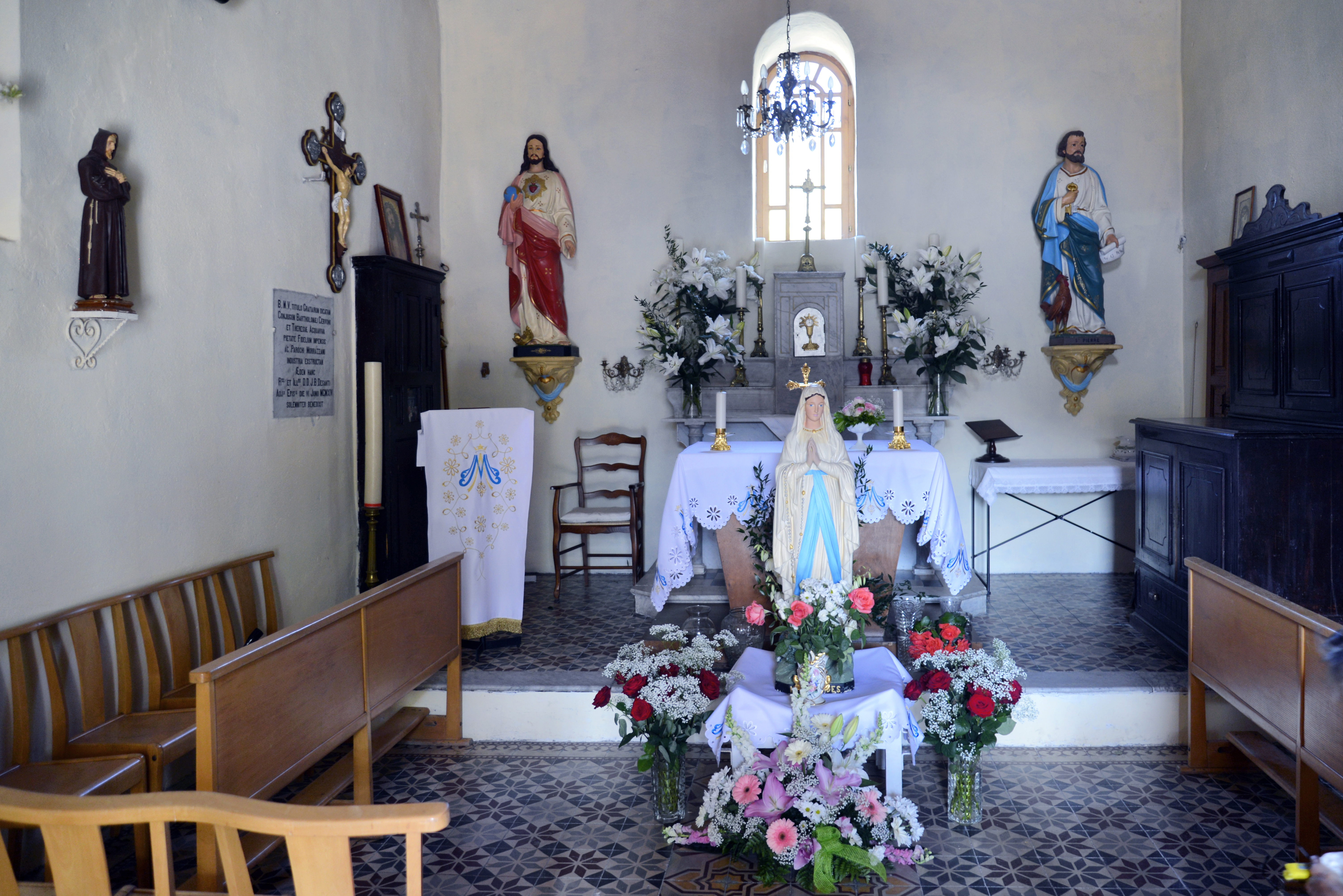 Omessa, Centre Corse - La chapelle Sainte-Marie de Francardo décorée pour le weekend de foire des 30 et 31 mai 2015